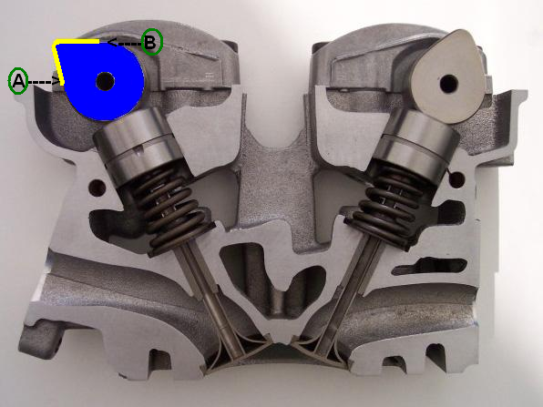 Corte de uma cabeça de motor vista em corte indicando posição da árvore de cames